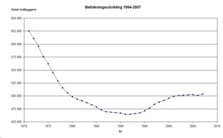 Population in Copenhagen, Denmark after 1970